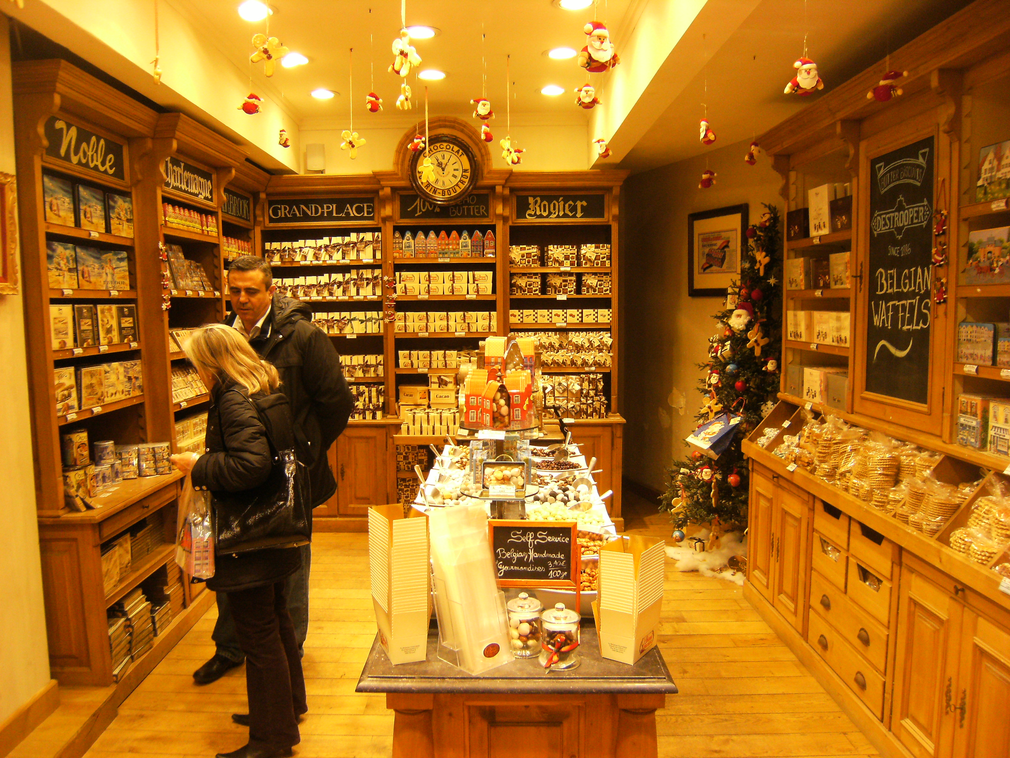 Chocolate, Brussels 2008.